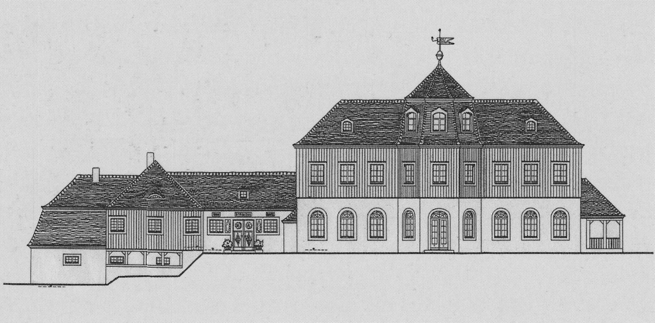 Radebeul HausInDerSonne Umbauzeichnung 1920